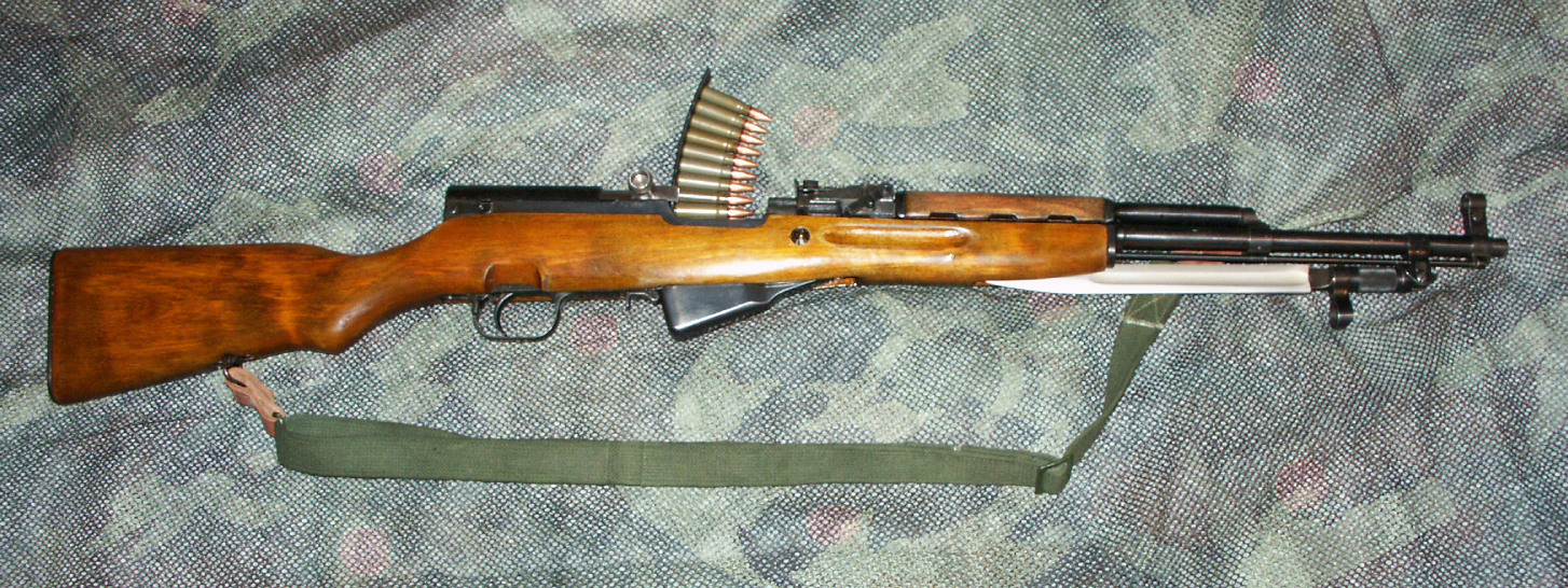 Russian 1954 SKS Tula Arsenal